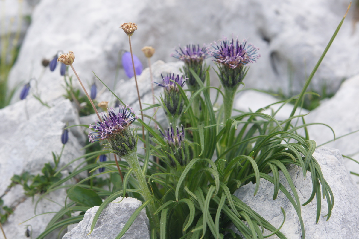 Pritlikava kosmatulja pod Špičkom.